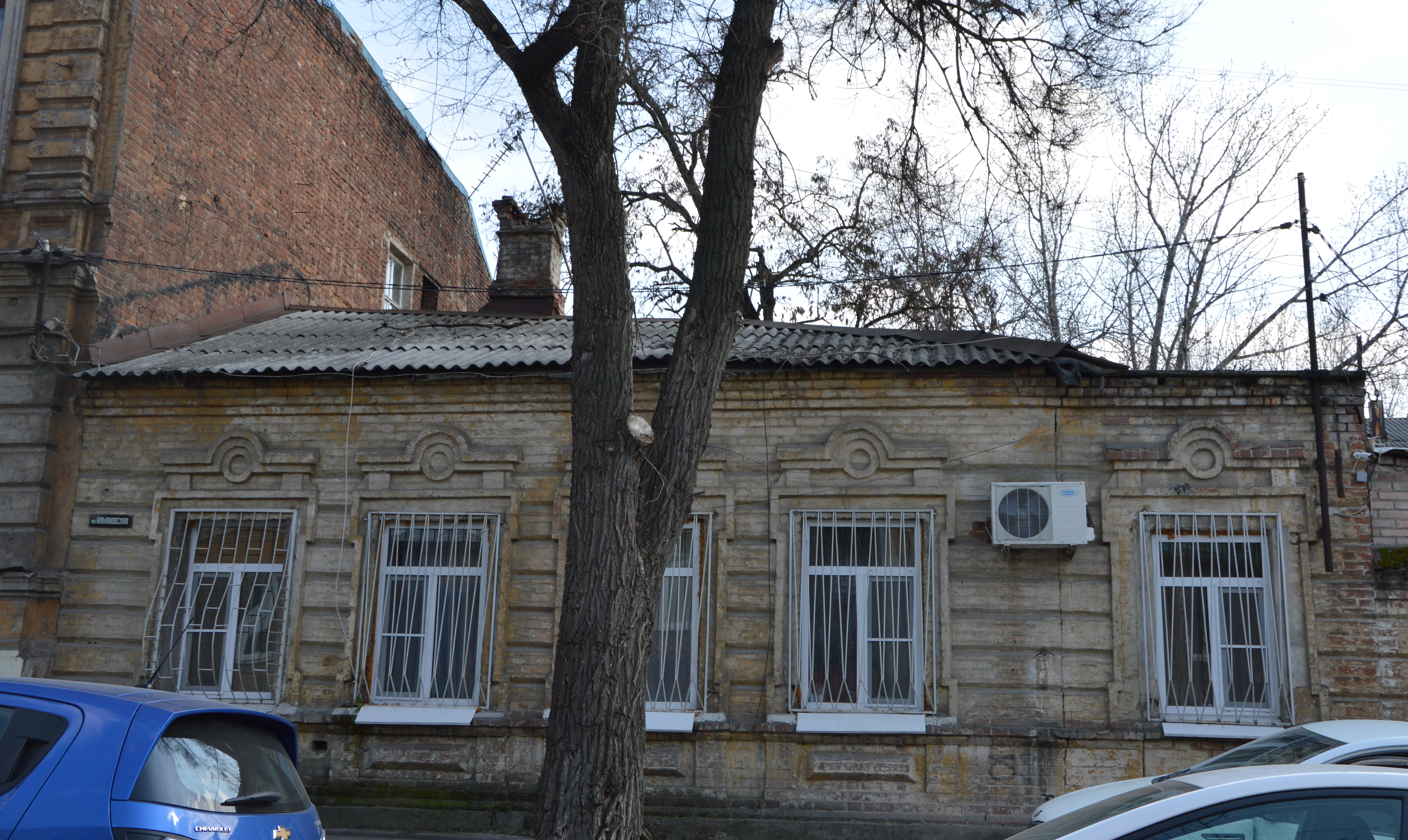 Здание города Ростова-на-Дону